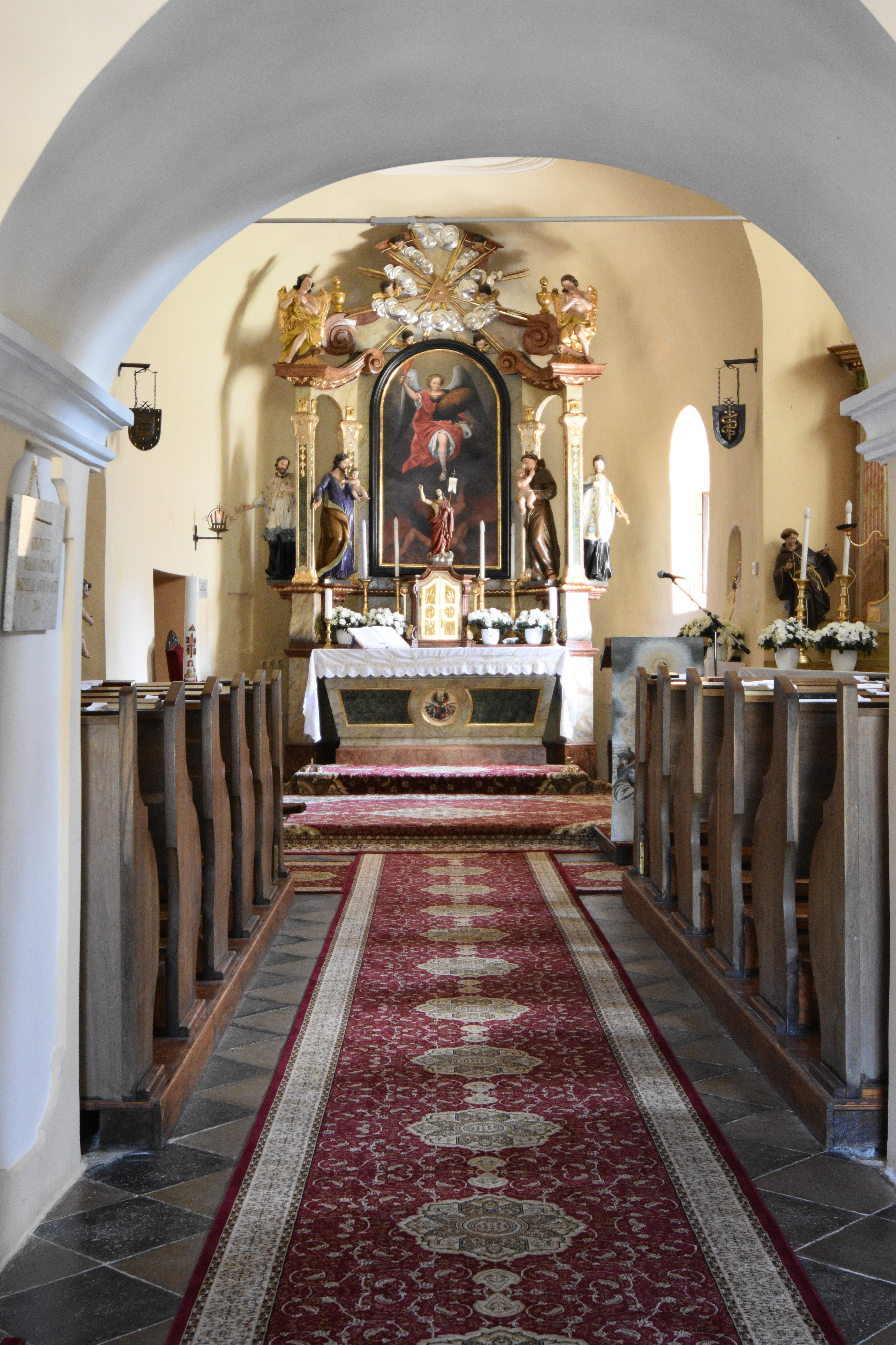 Kirche in Bucsu